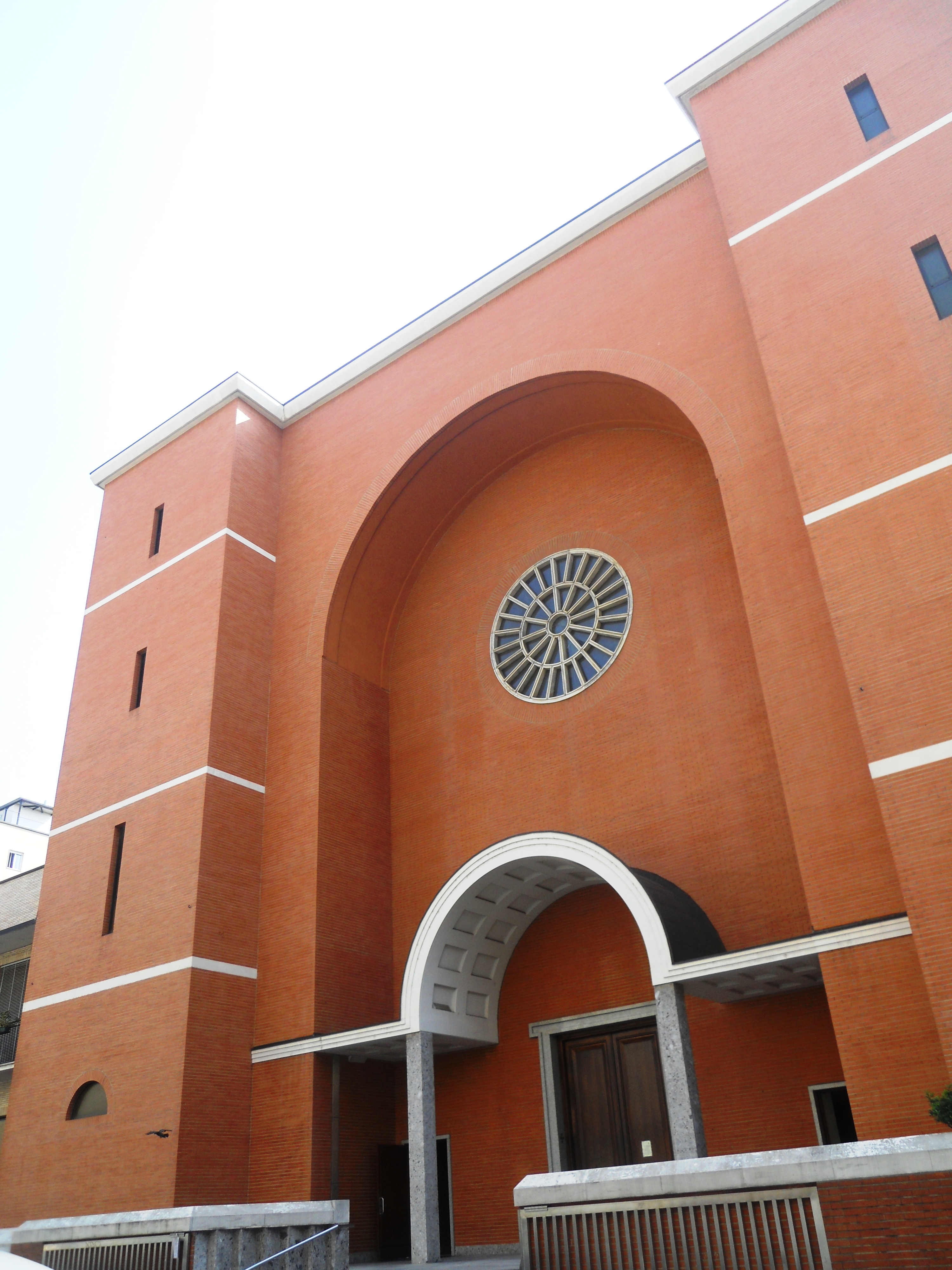 La facciata della chiesa dei Santi Silvestro e Martino in Milano.